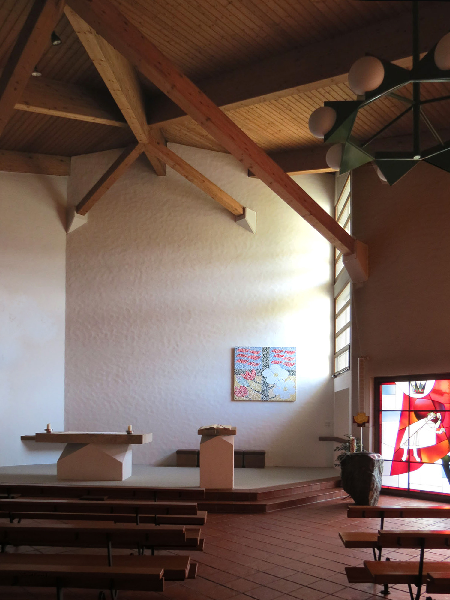 Römisch-katholische Pfarrkirche St. Georg Elgg, Altarraum